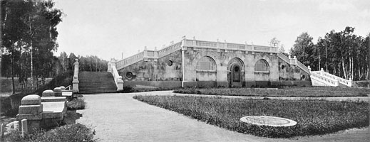 139. Воробьевскiй резервуаръ.